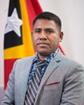 Leandro Lobato, Abgeordneter des Nationalparlaments Osttimros